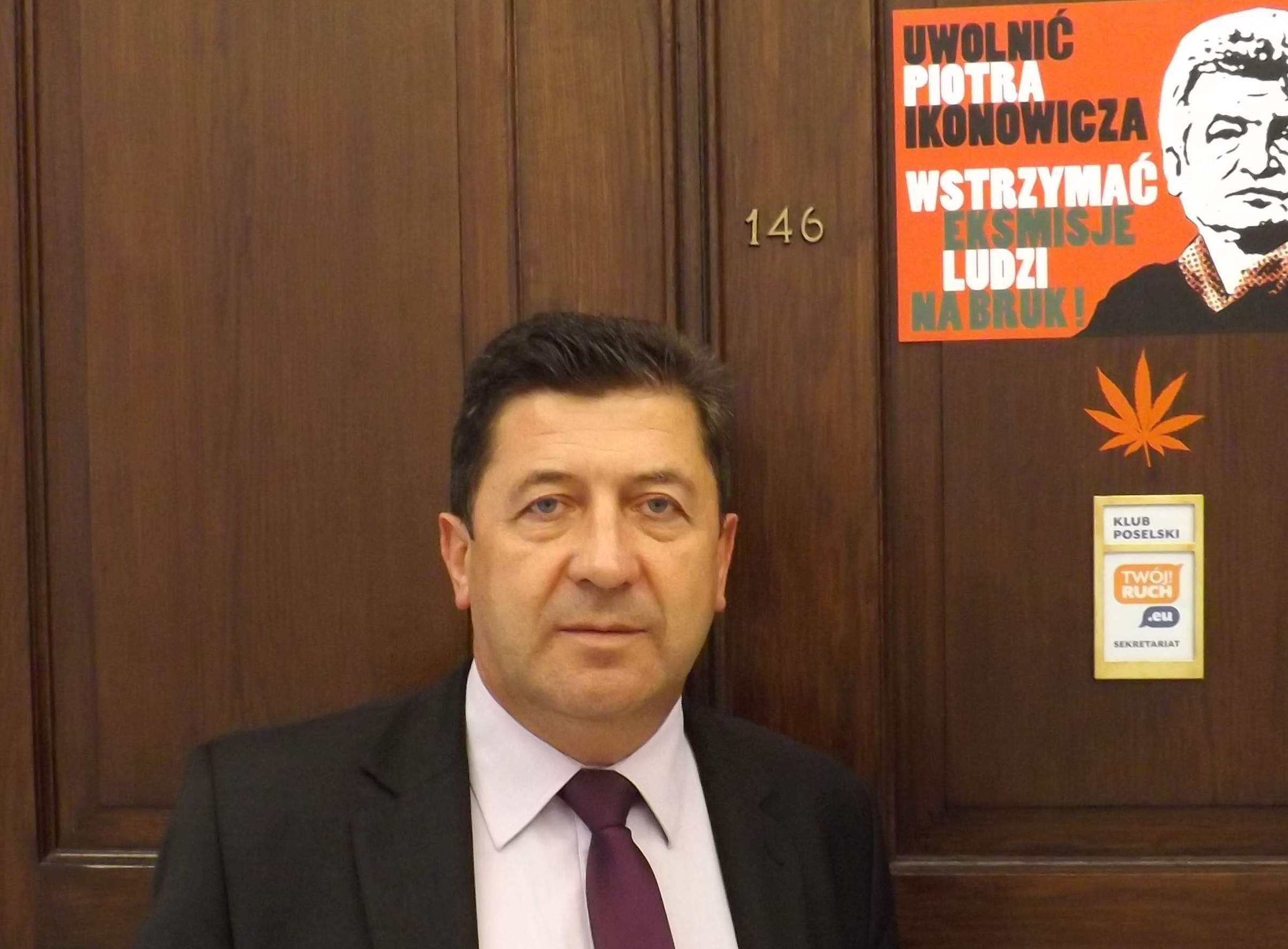 Jan Cedzyński, poseł Twojego Ruchu.